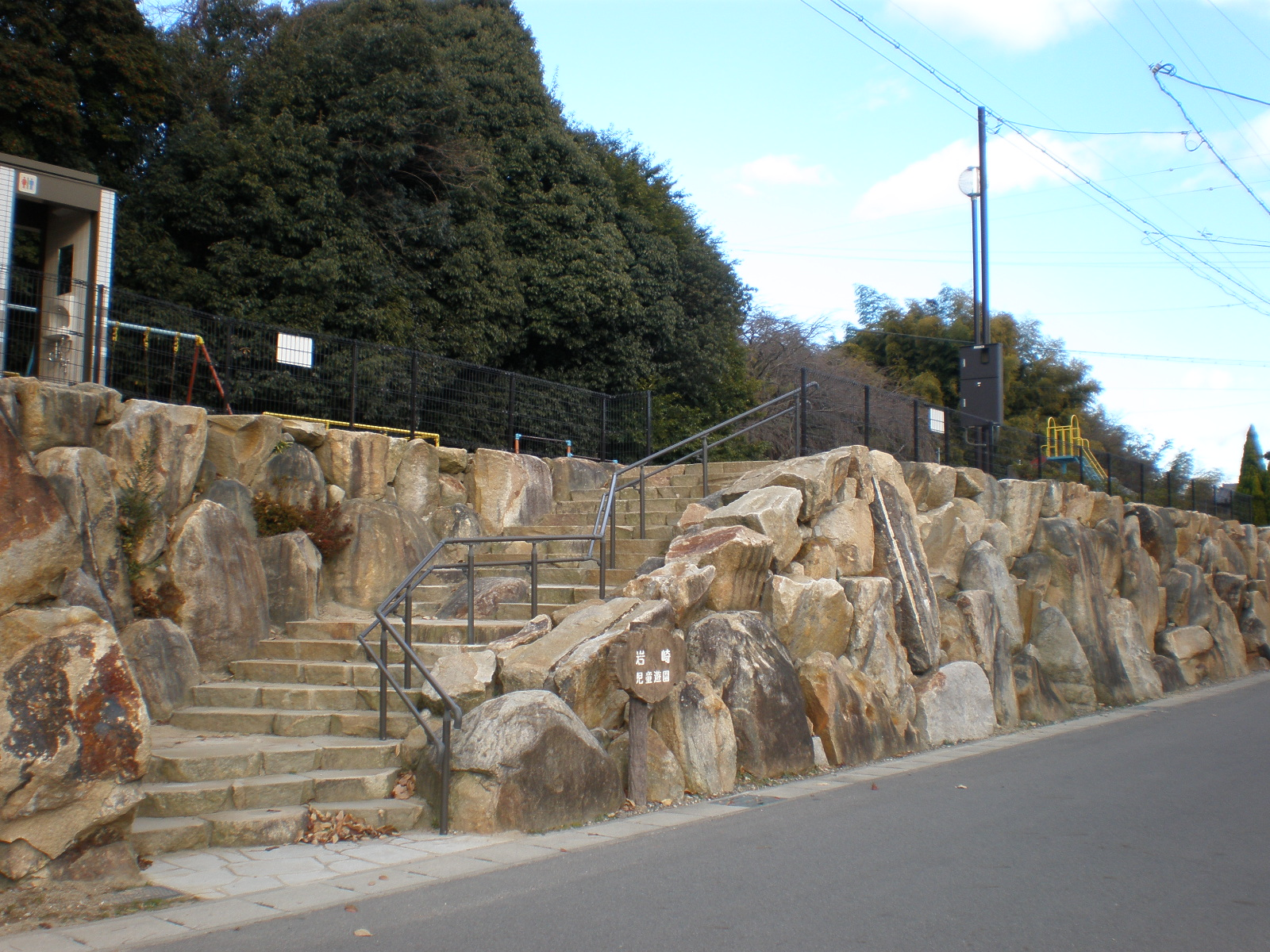 愛知県小牧市の岩崎山にある岩崎児童遊園